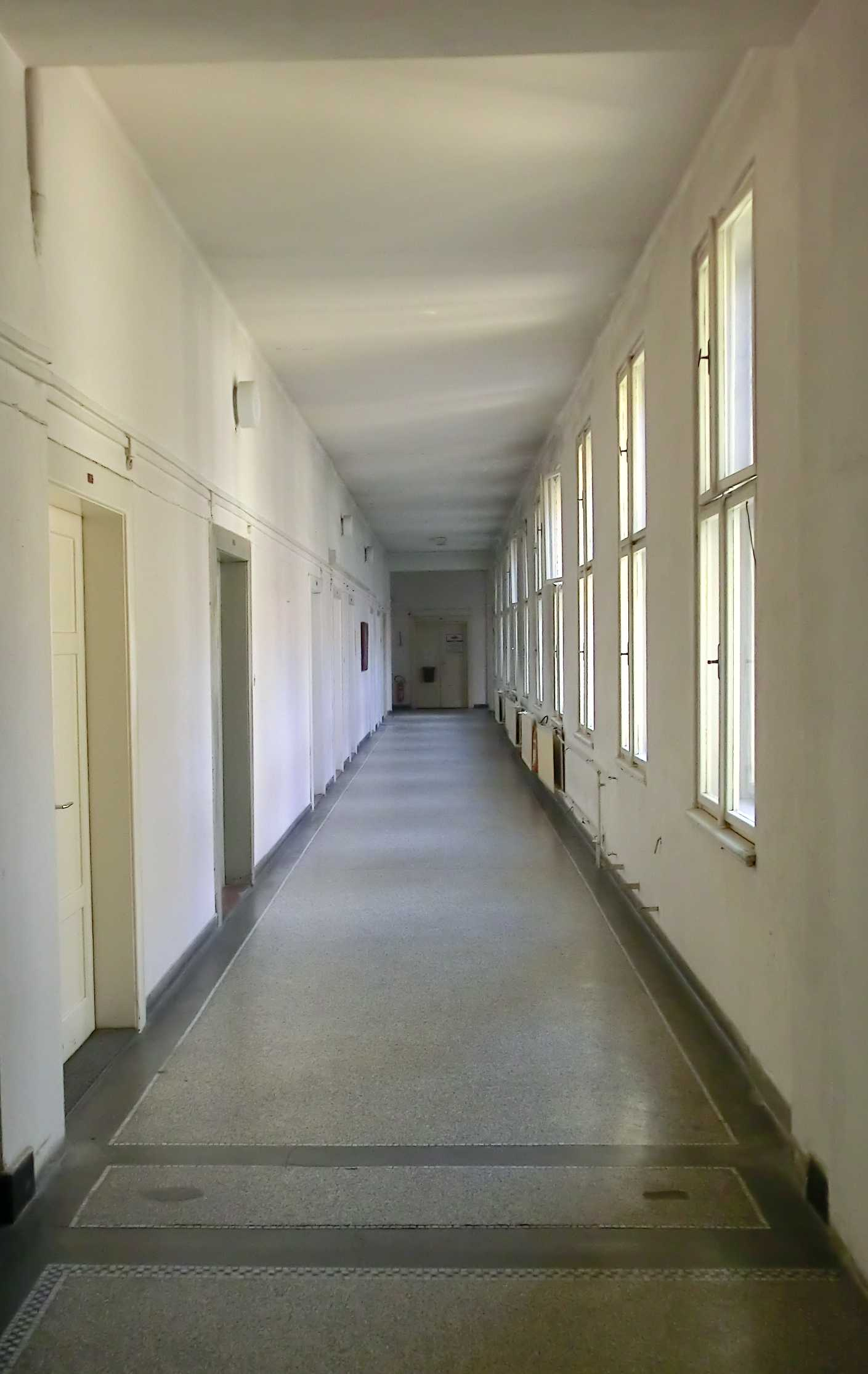 Budova pošty (bývalého Okresního soudu) v Jilemnici - chodba bývalého soudního úřadu ve II. patře